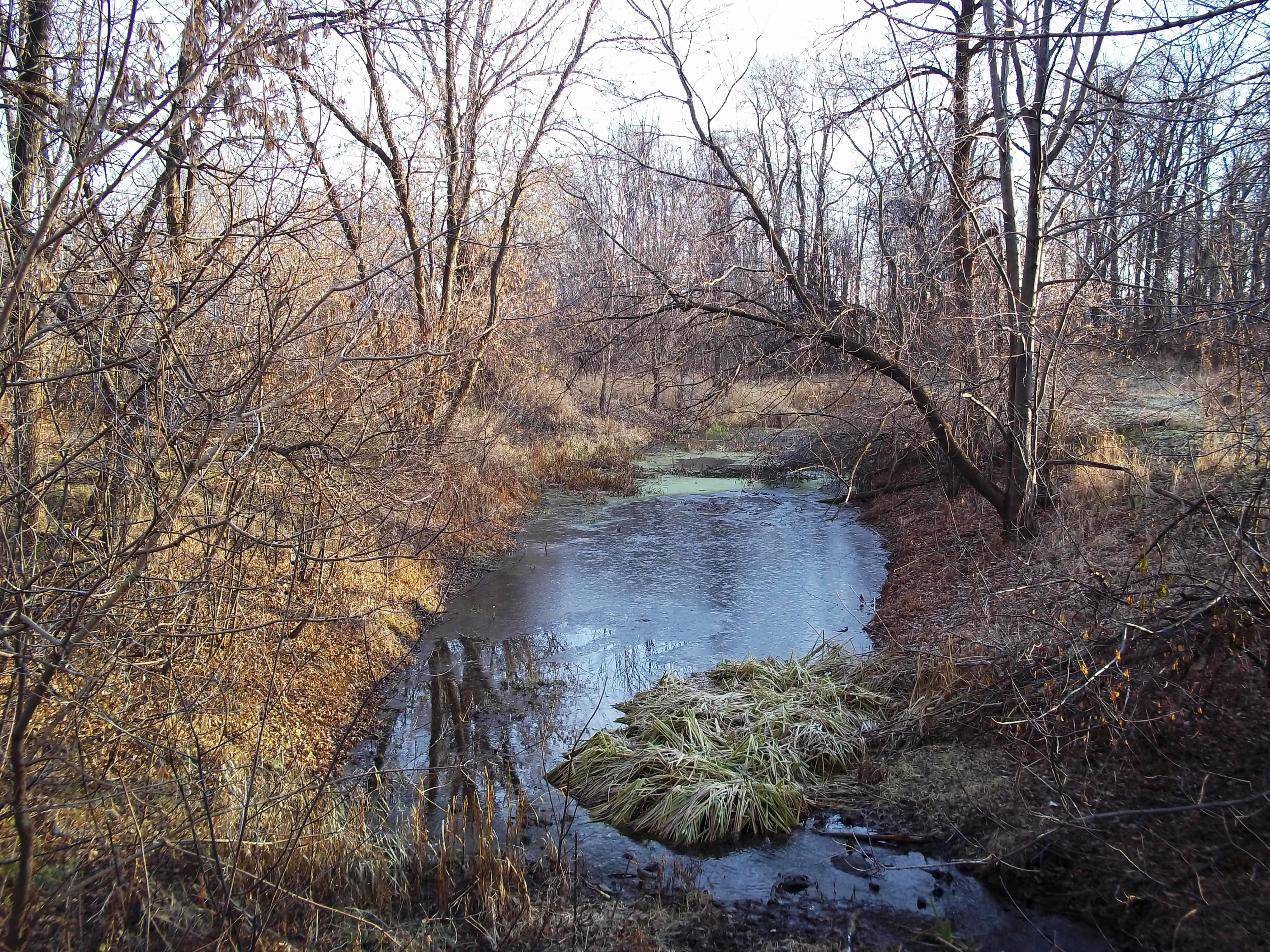 Coulée Grou